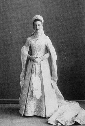 Графиня Екатерина Васильевна Уварова, ур. Гудович (1868—1948)